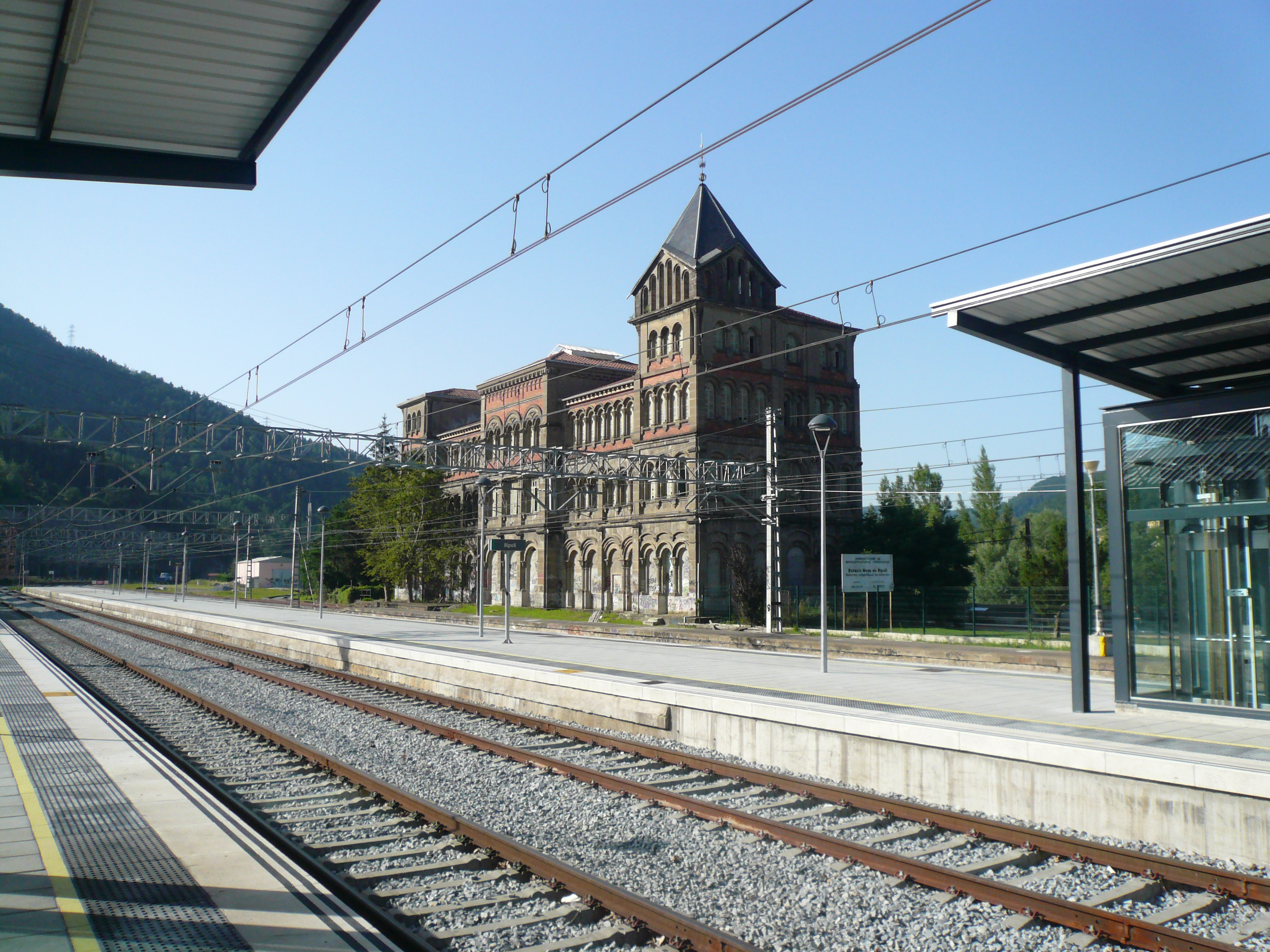 Estació vella de Ripoll. C. Progrés (Ripoll). Object location42° 11′ 45.84″ N, 2° 11′ 45.31″ E